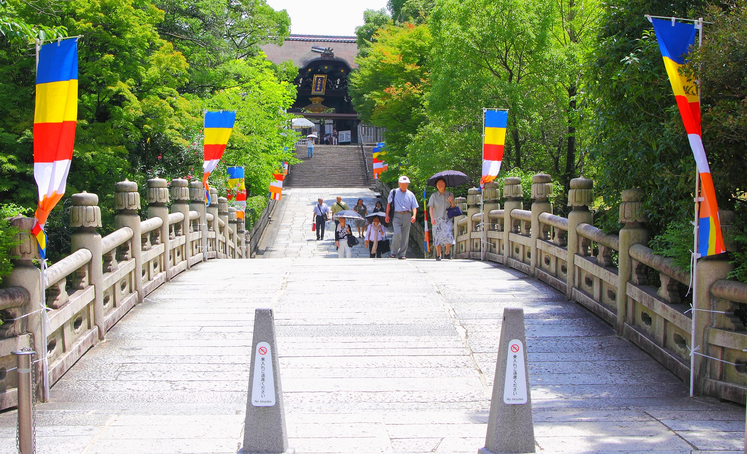 大谷本廟-総門